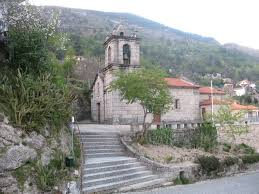 Ansiães Igreja Matriz